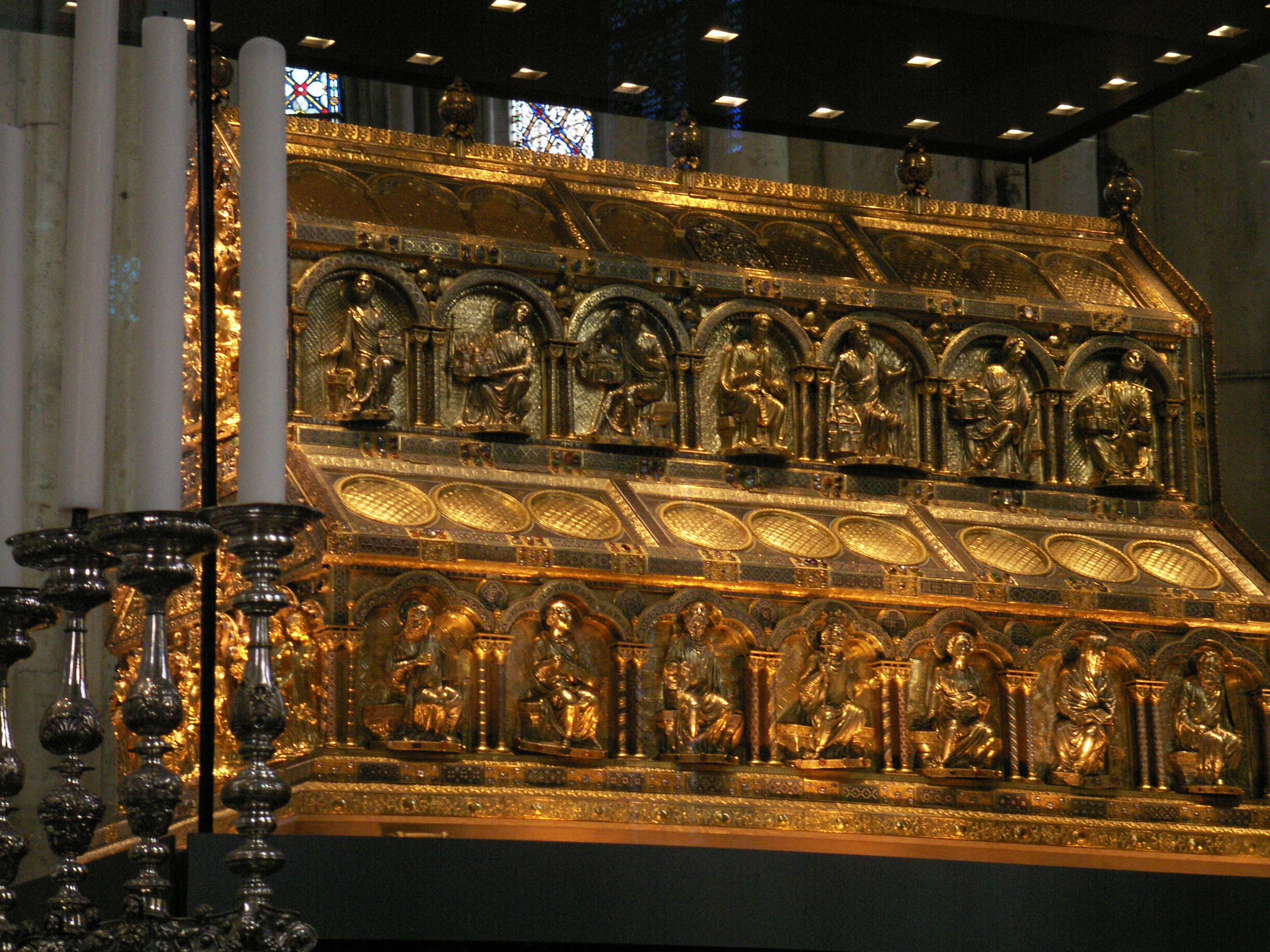 Dreikönigenschrein, Kölner Dom